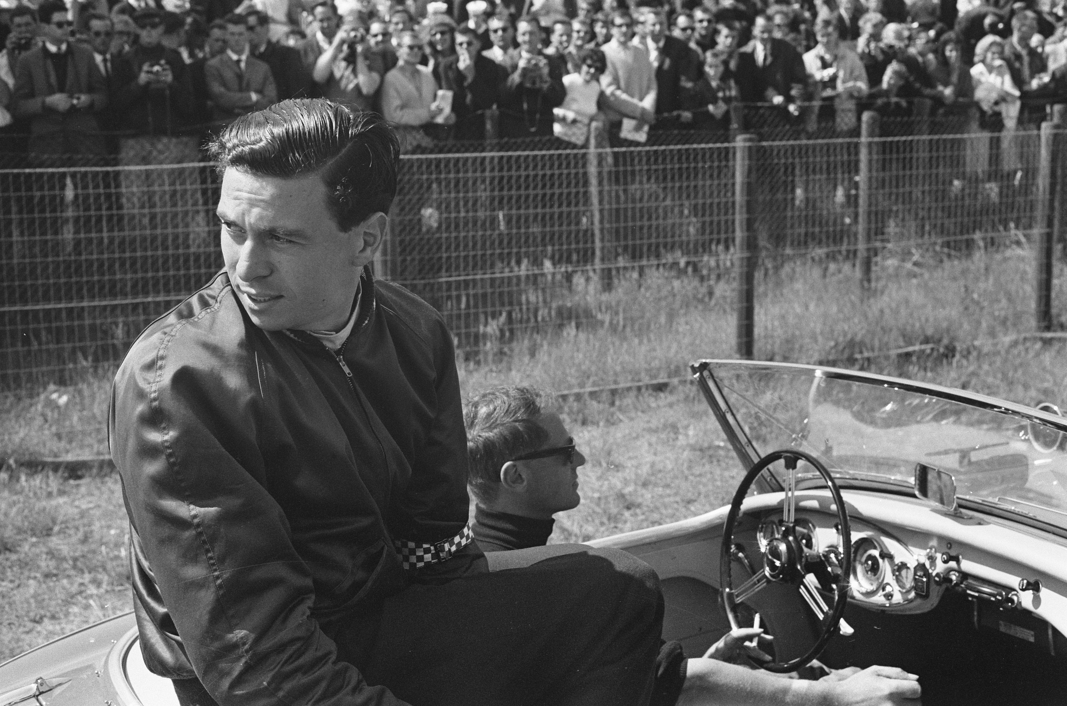 Grand Prix te Zandvoort. Jim Clark.